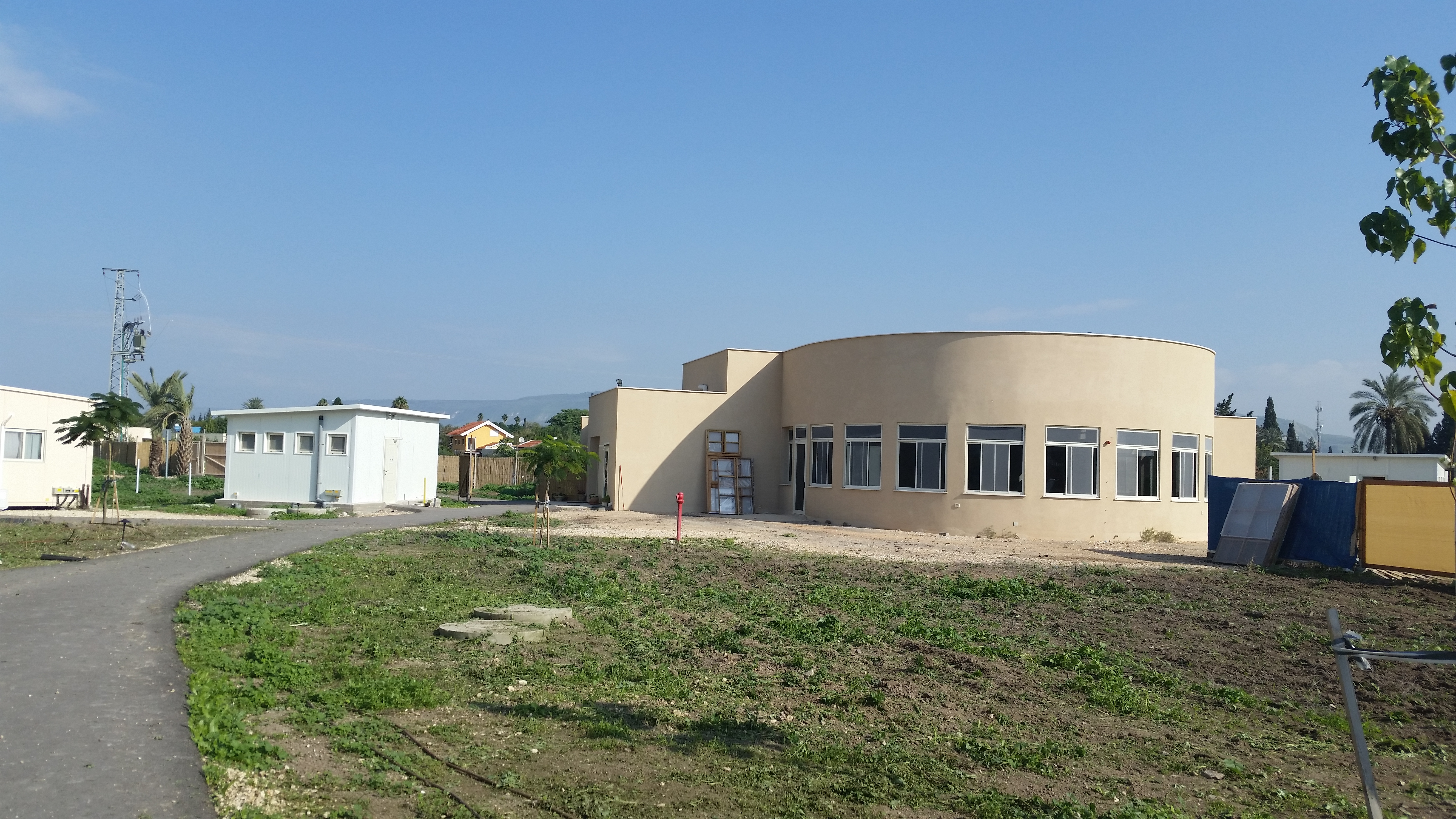 מרכז ויפאסאנה בדגניה ב